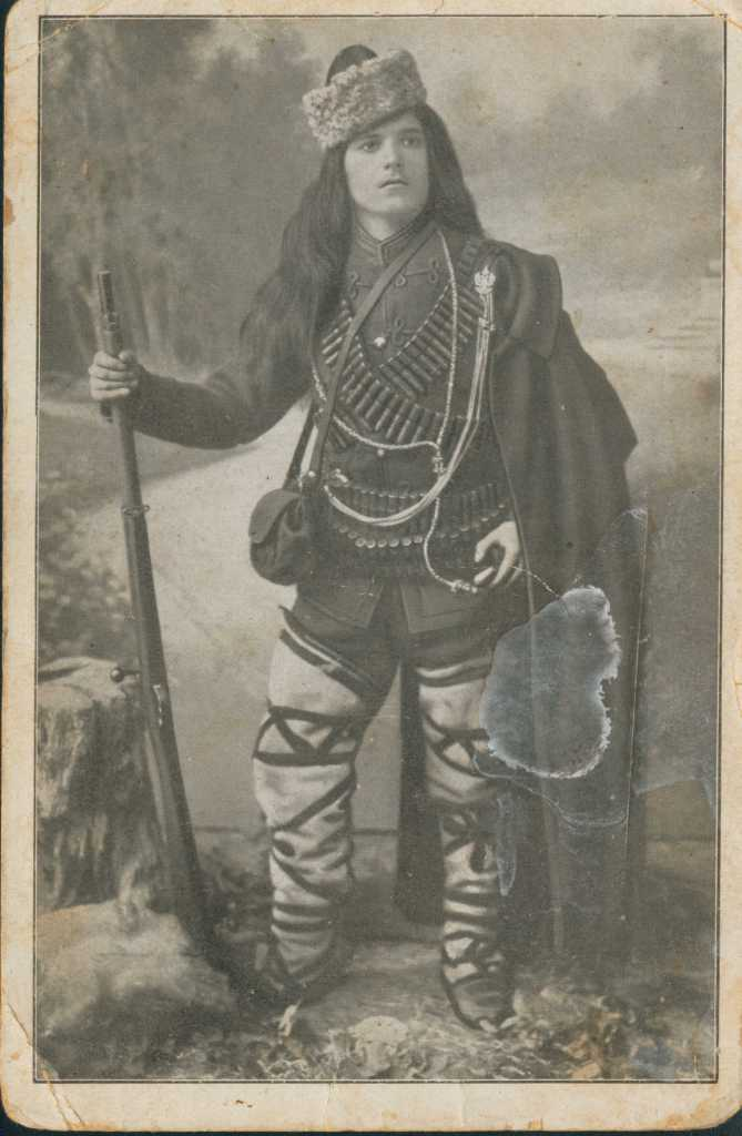 Донка Ушлинова - участничка в Илинденското въстание, Македоно-Одринското опълчение и Единадесета пехотна македонска дивизия. Донка Ушлинова.